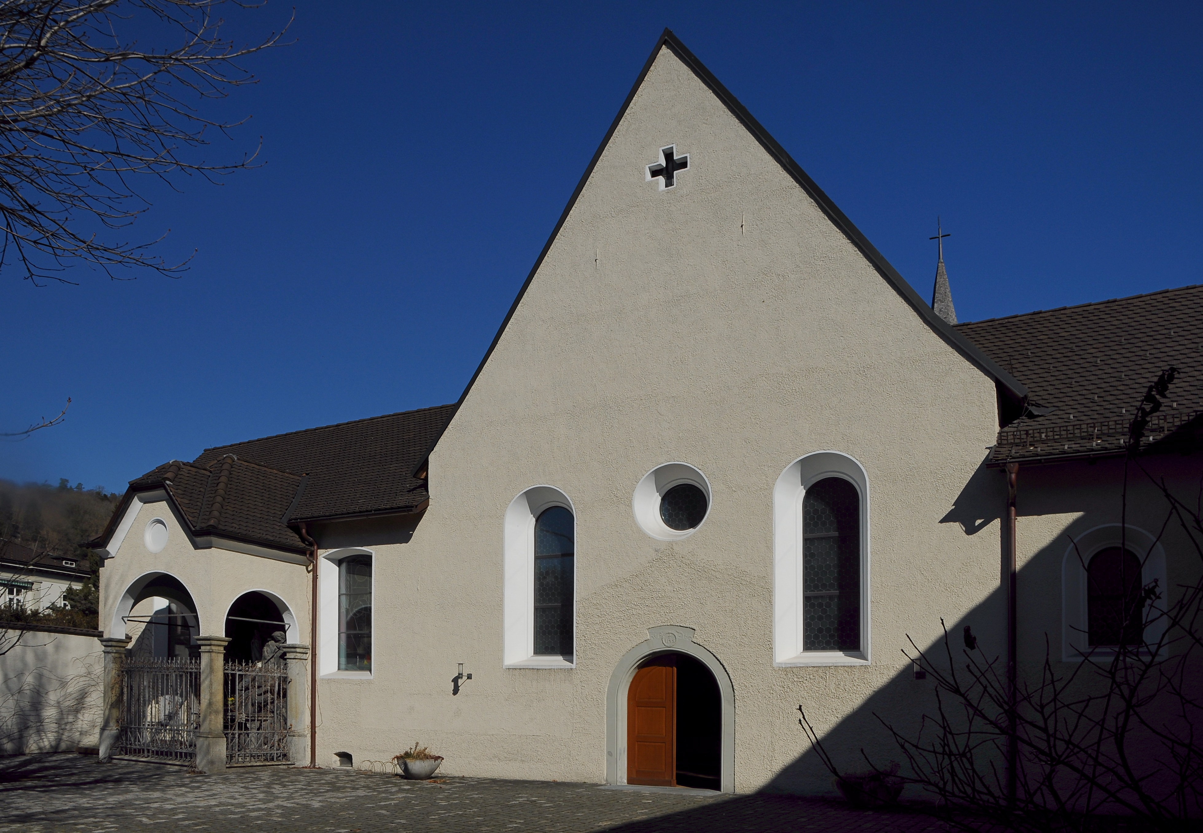 Das Kapuzinerkloster Feldkirch wurde 1602 gegründet. Die Kirche wurde im Jahre 1605 vom Churer Bischof Johann V. Flugi geweiht. Besondere Verehrung genießt der heilige Fidelis von Sigmaringen, der 1621 Guardian in Feldkirch war und 1622 in Seewies ermordet wurde. Fidelis wurde 1746 heiliggesprochen. Der heilige Fidelis ist neben dem heiligem Gebhard der Patron der Diözese Feldkirch.